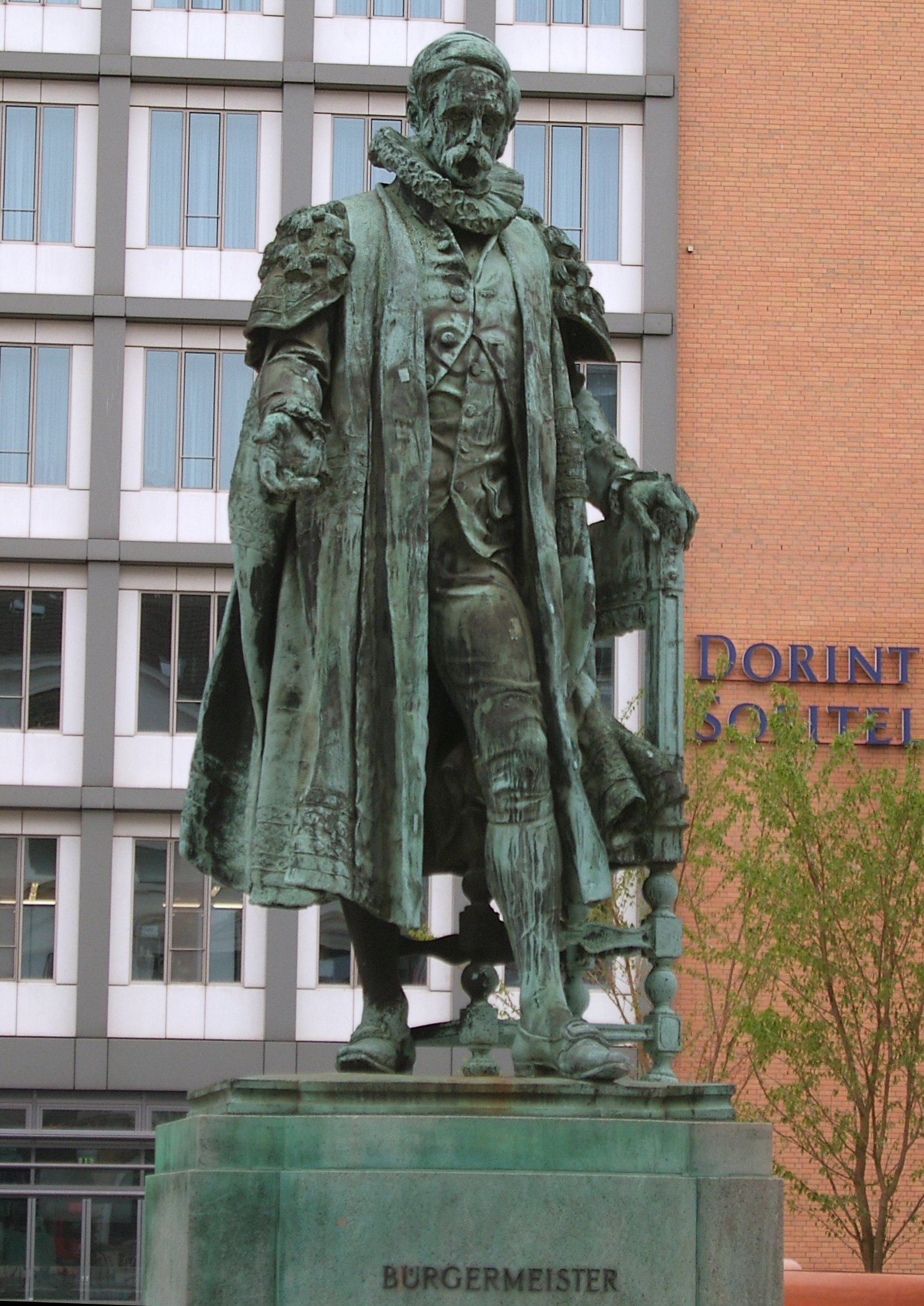 Denkmal für Carl Friedrich Petersen am Neuen Wall in Hamburg-Neustadt, errichtet 1892. Bildhauer: Oskar Victor Tilgner